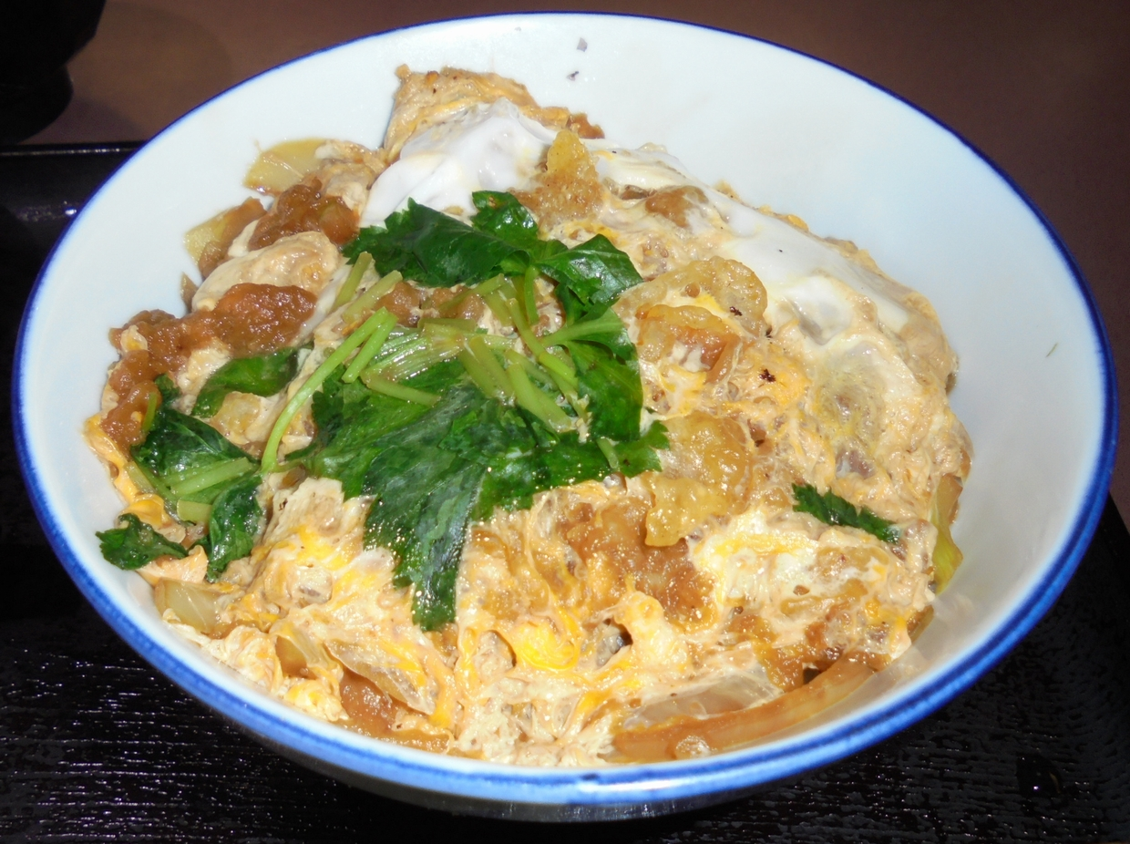 たぬき丼 (Tanuki-don,Donburi).